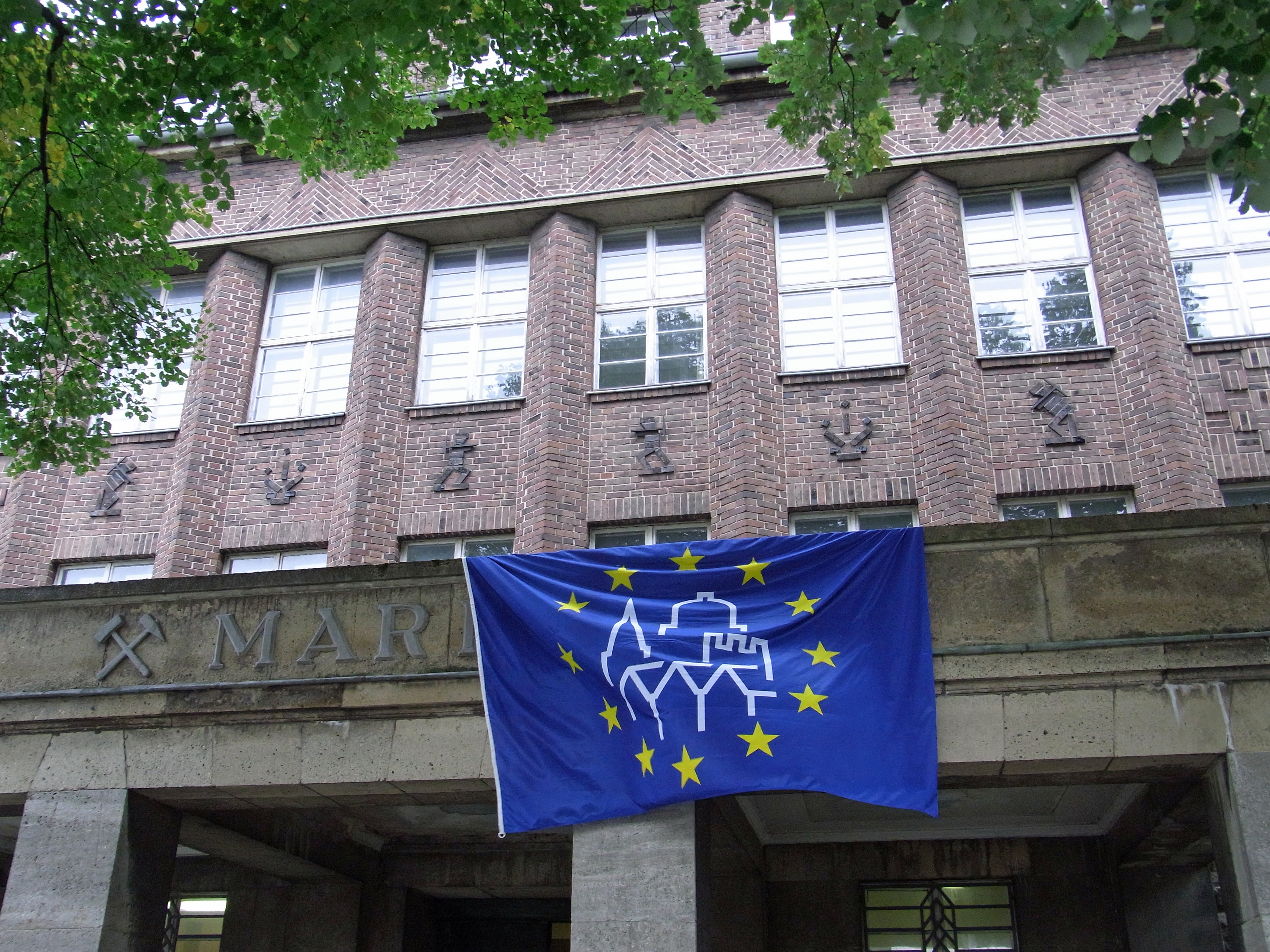 Tag des offenen Denkmals 2010: Hagen Ehemaliges Haus der Ruhrkohle